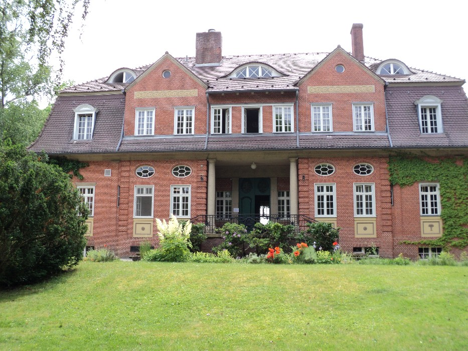 ehemalige Villa des Bankiers Carl Joerger in Berlin-Wannsee, Hohenzollernstraße 14; heutiges Wannseeforum